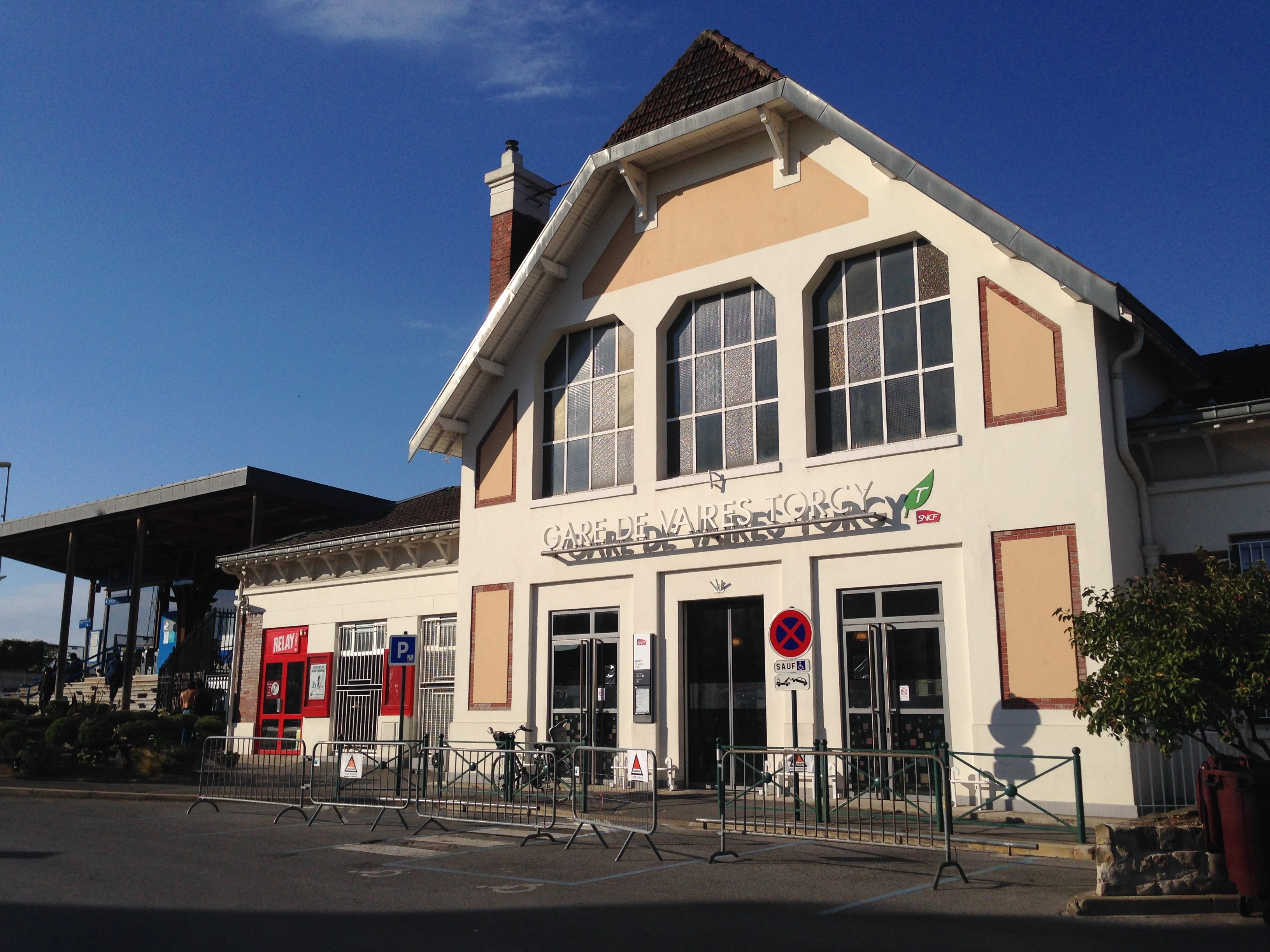 Gare de Vaires - Torcy en 2016